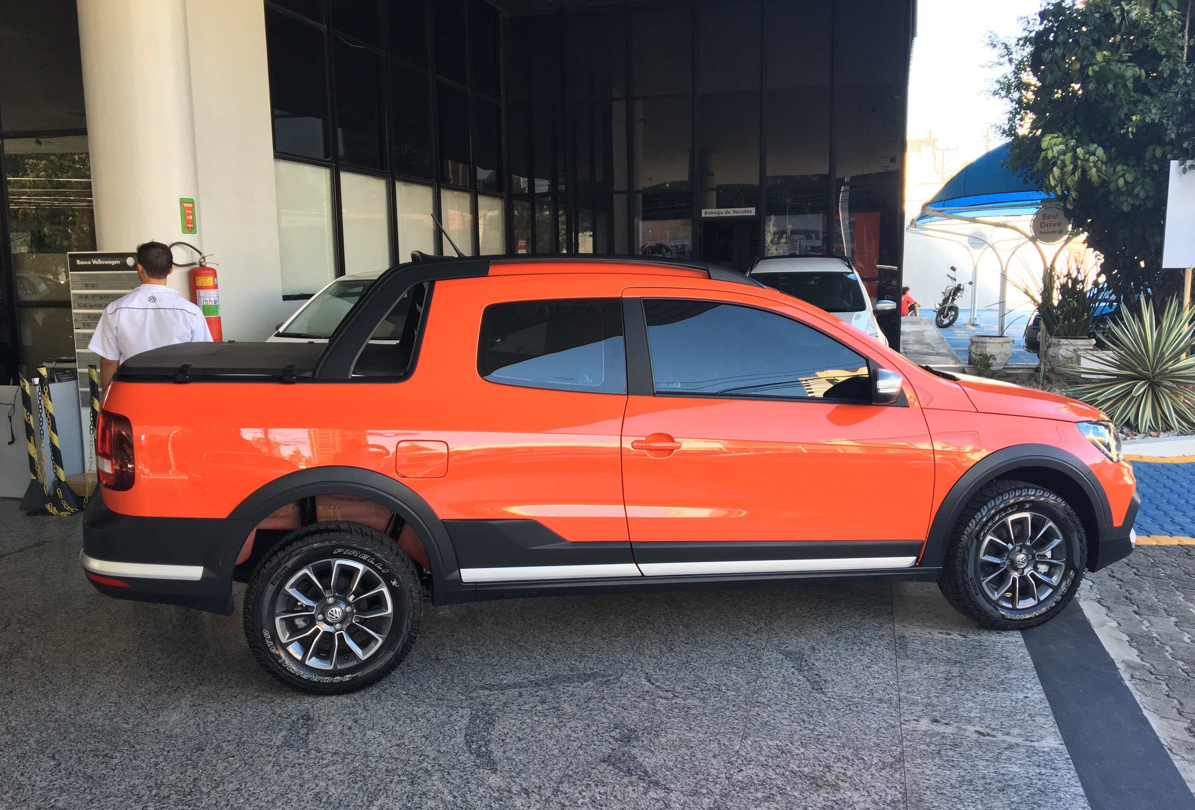 VW Saveiro